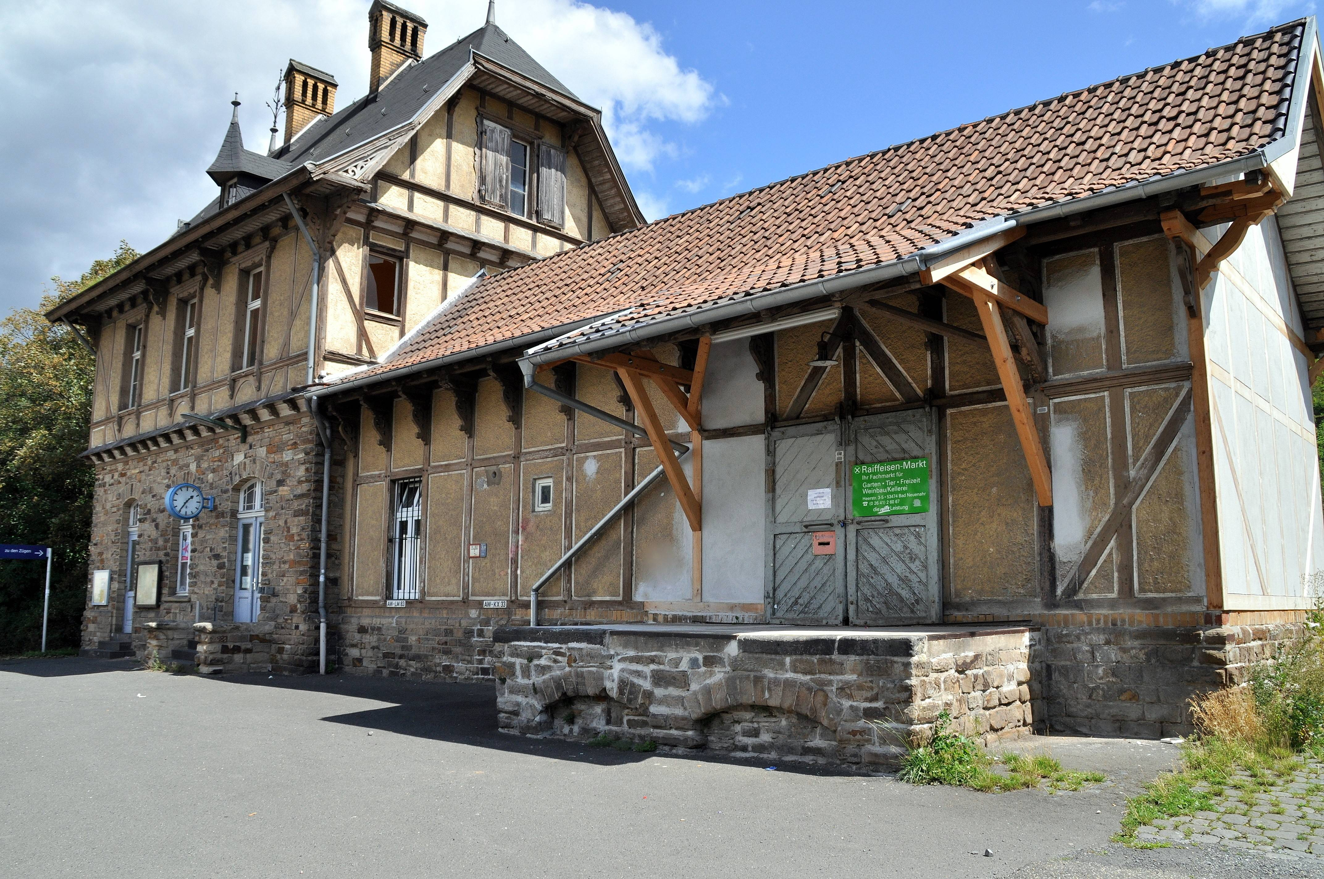 Dernau Bahnhof, Straßenfront